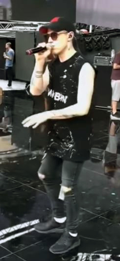 Irama, o Filippo Maria Fanti in concerto.